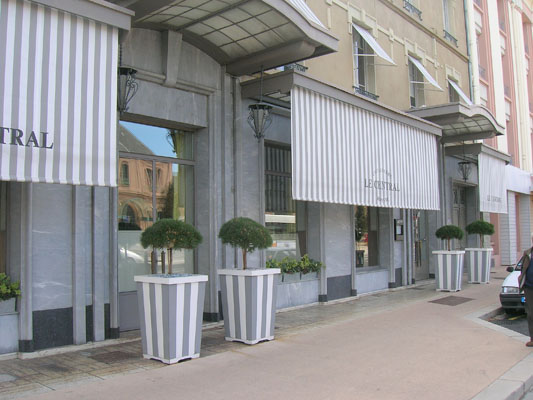 Café-Epicerie Le Central - Roanne